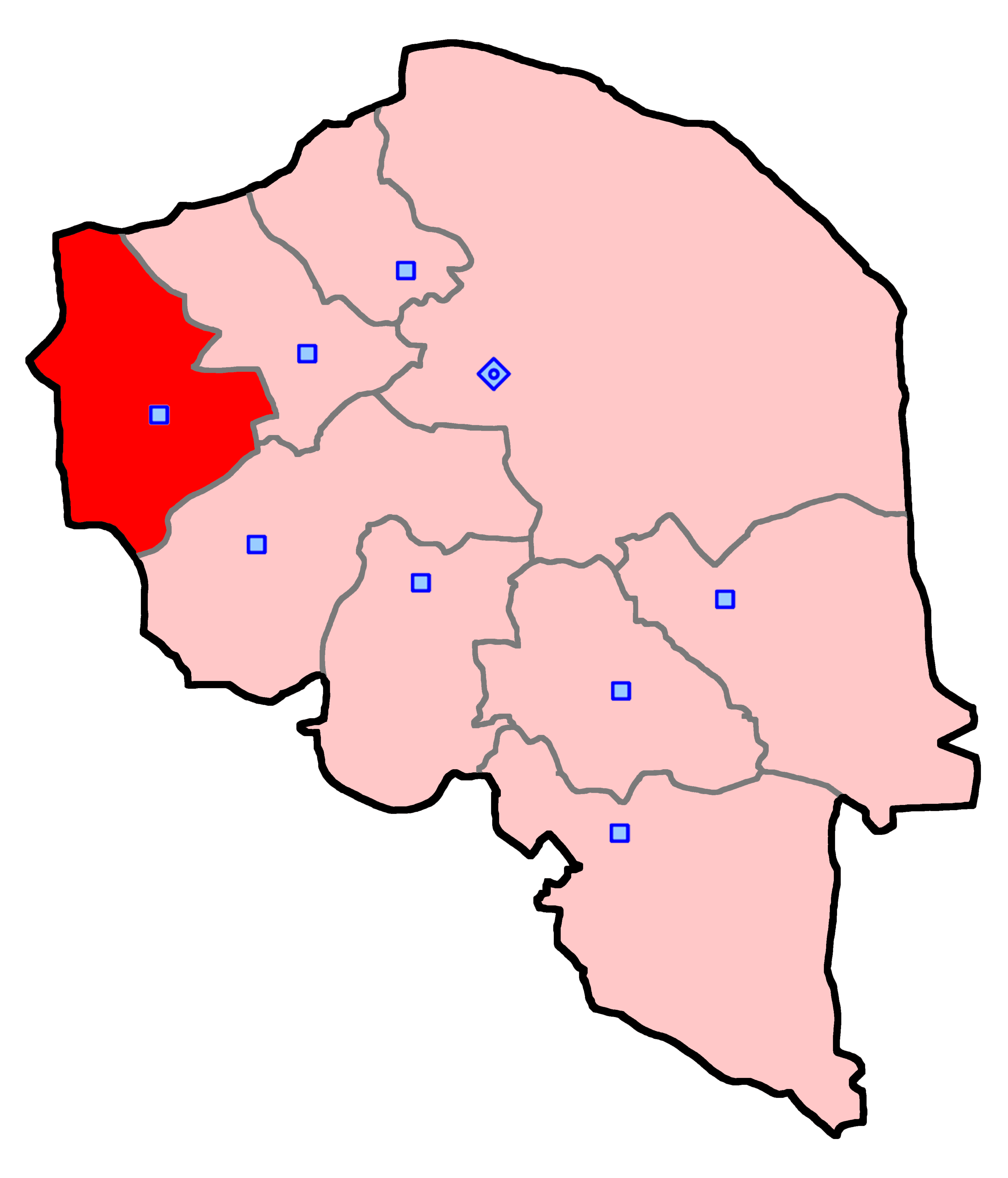 شهربابک برای انتخابات مجلس شورای اسلامی